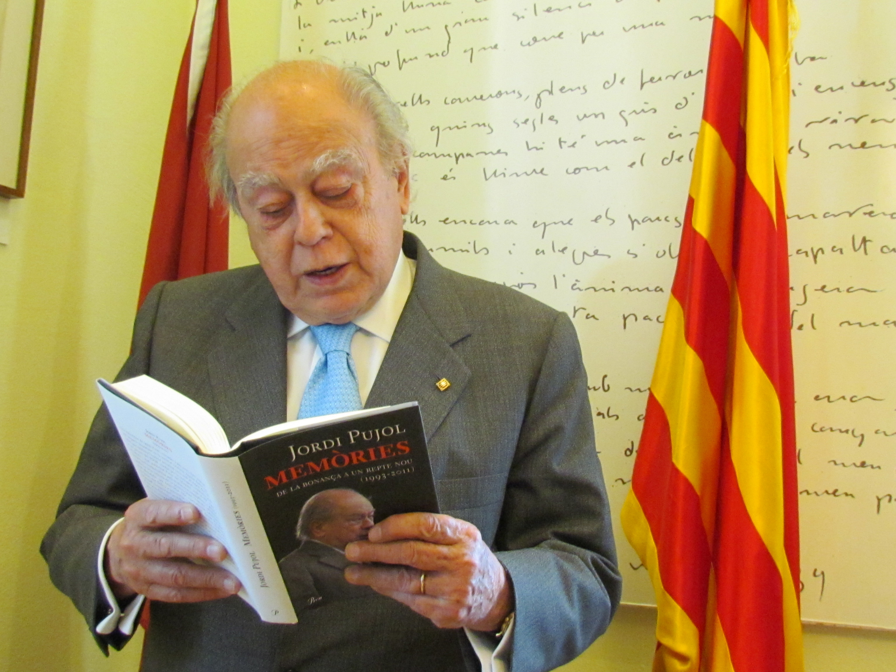 Presentació del tercer volum de les memòries de Jordi Pujol a Lleida.